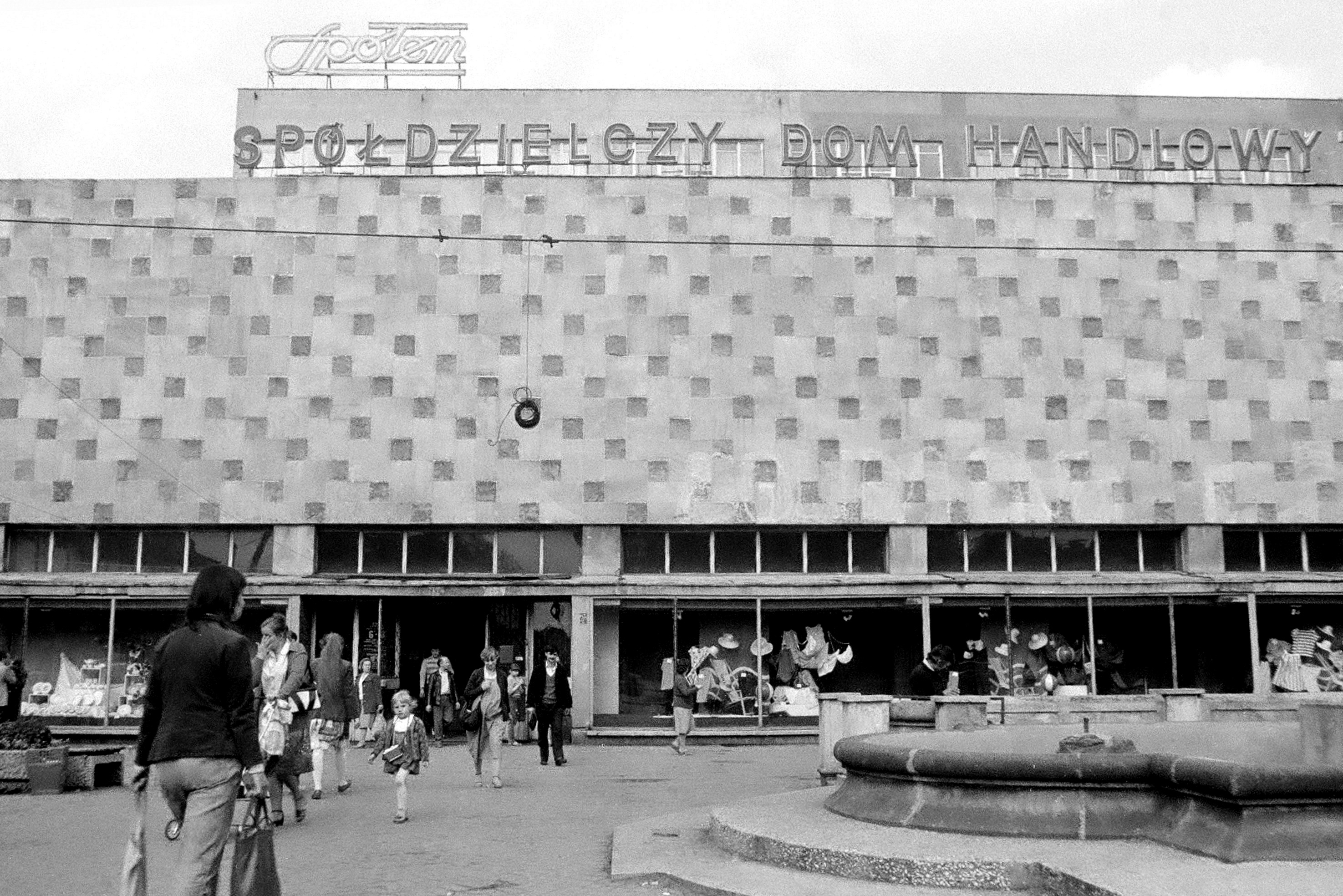 Spółdzielczy Dom Handlowy "Kokos" w Gorzowie Wlkp. Na ścianie nad witryną sklepu, ślad po usuniętym napisie "Solidarność" wykonanym przez członków RMN w Gorzowie Wlkp. (1985 r.)